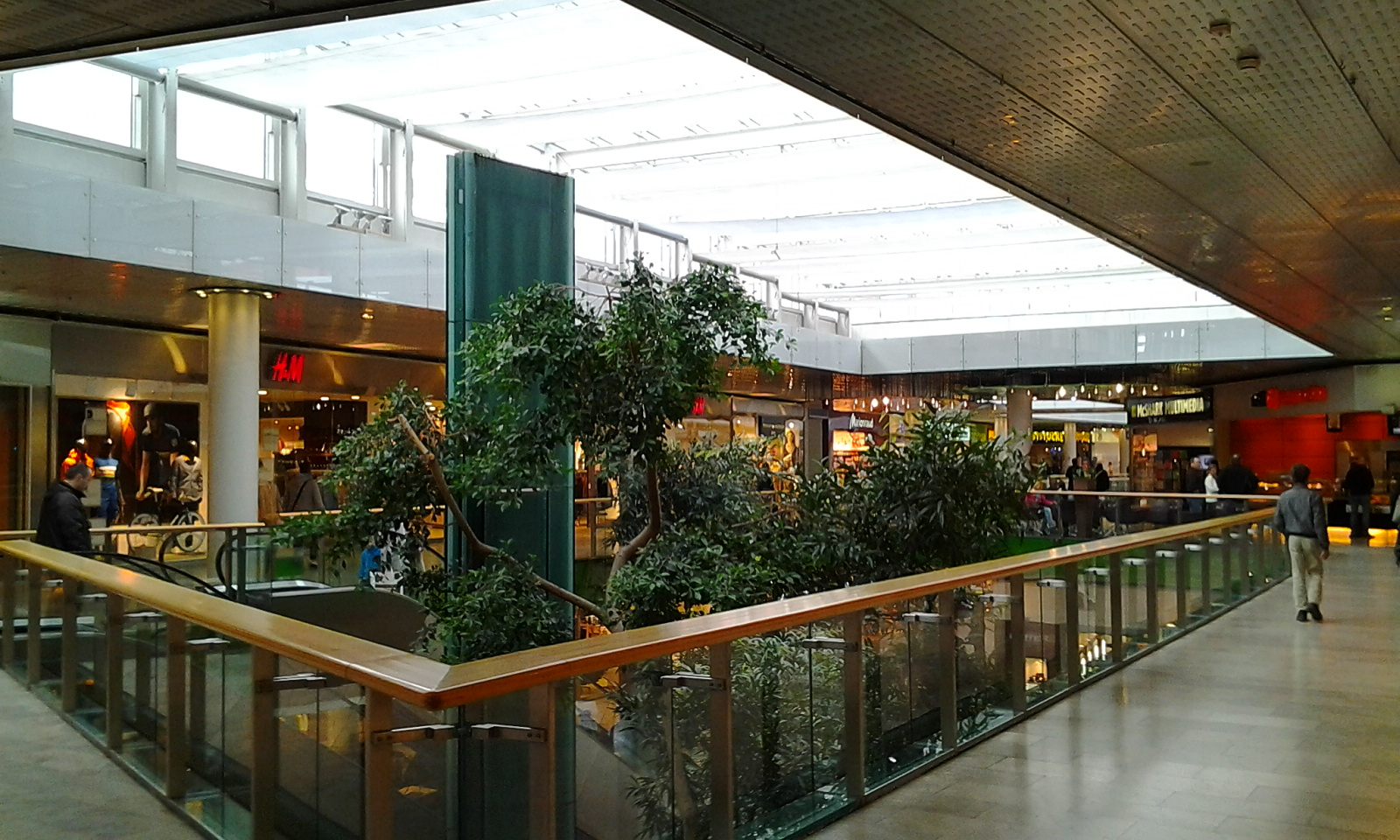 Einkaufszentrum Europark in Salzburg-Taxham, März 2013, obere Etage